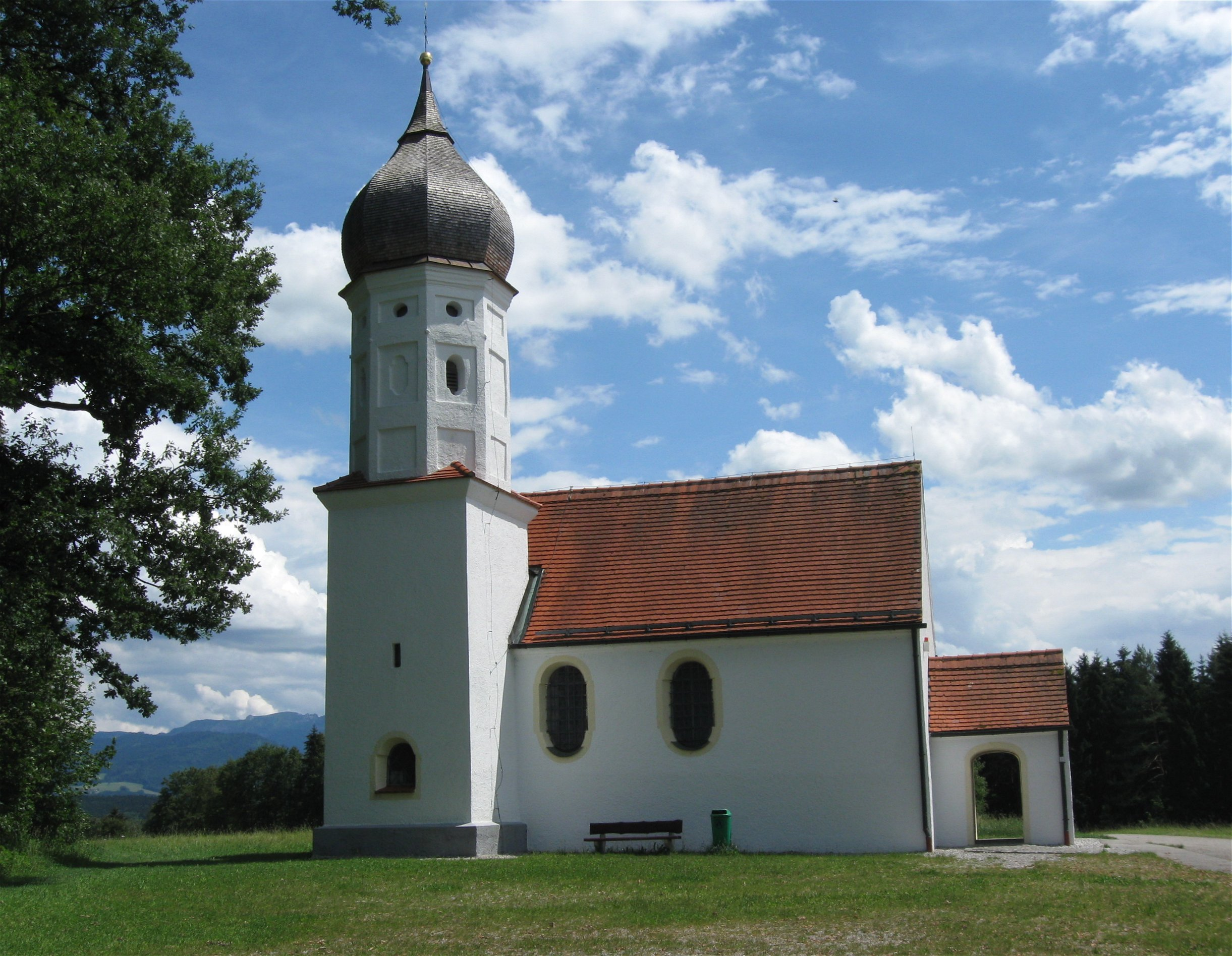 Maria Heimsuchung; Hub; erbaut 1630, umgestaltet 1696; mit Ausstattung